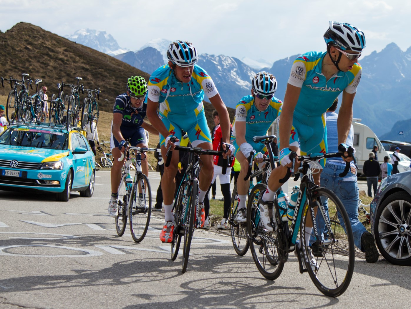 giau 180 kreuziger met seeldraeyers